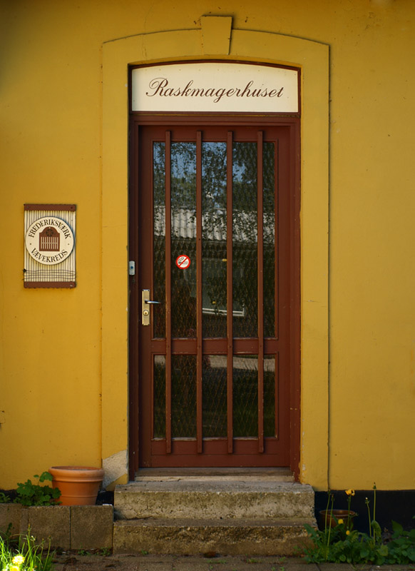 Indgang til Frederiksværk Vævekreds lokaler i Raskmagerhuset, Frederiksværk